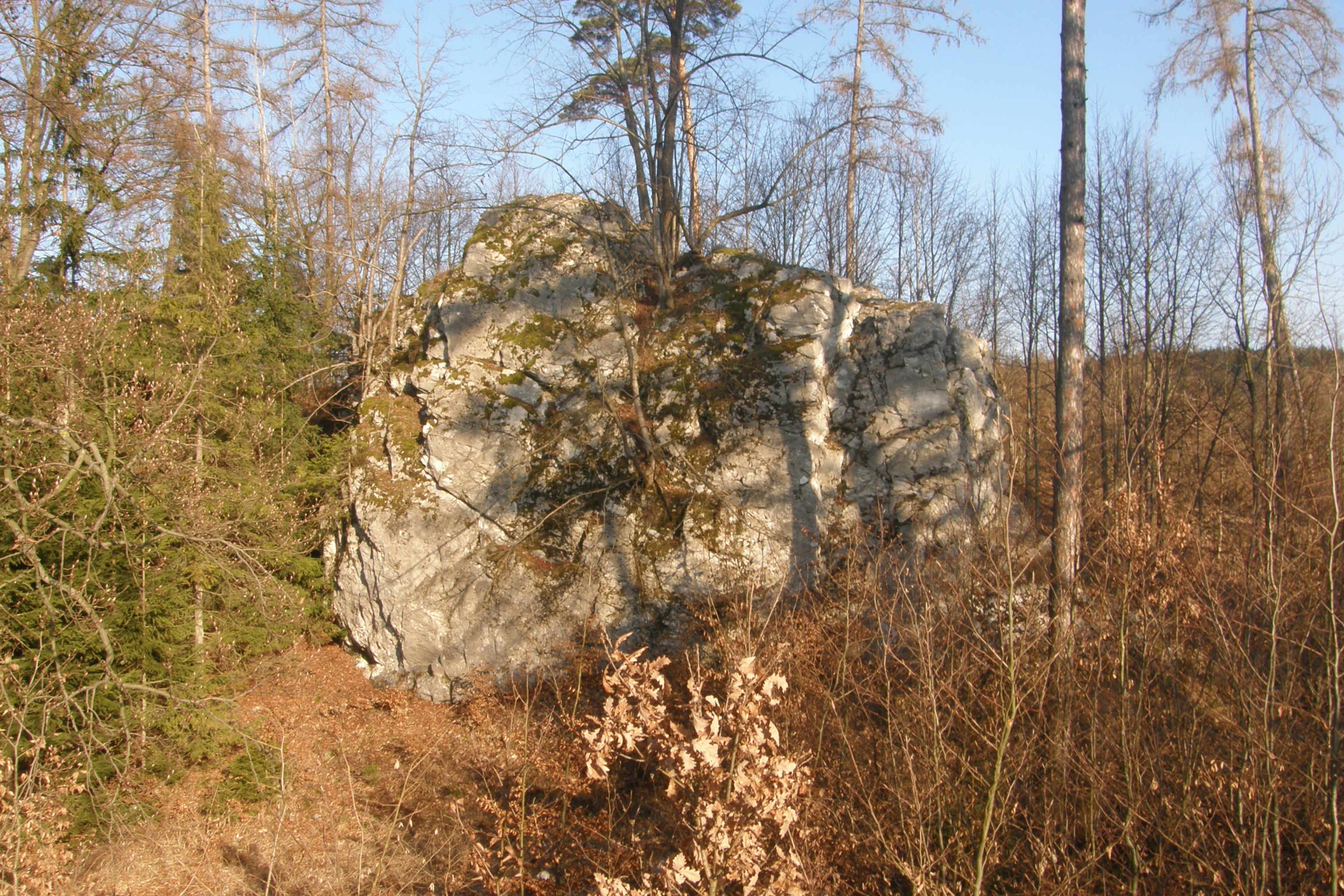 Malý hřebenáč ve Vratíkovském krasu